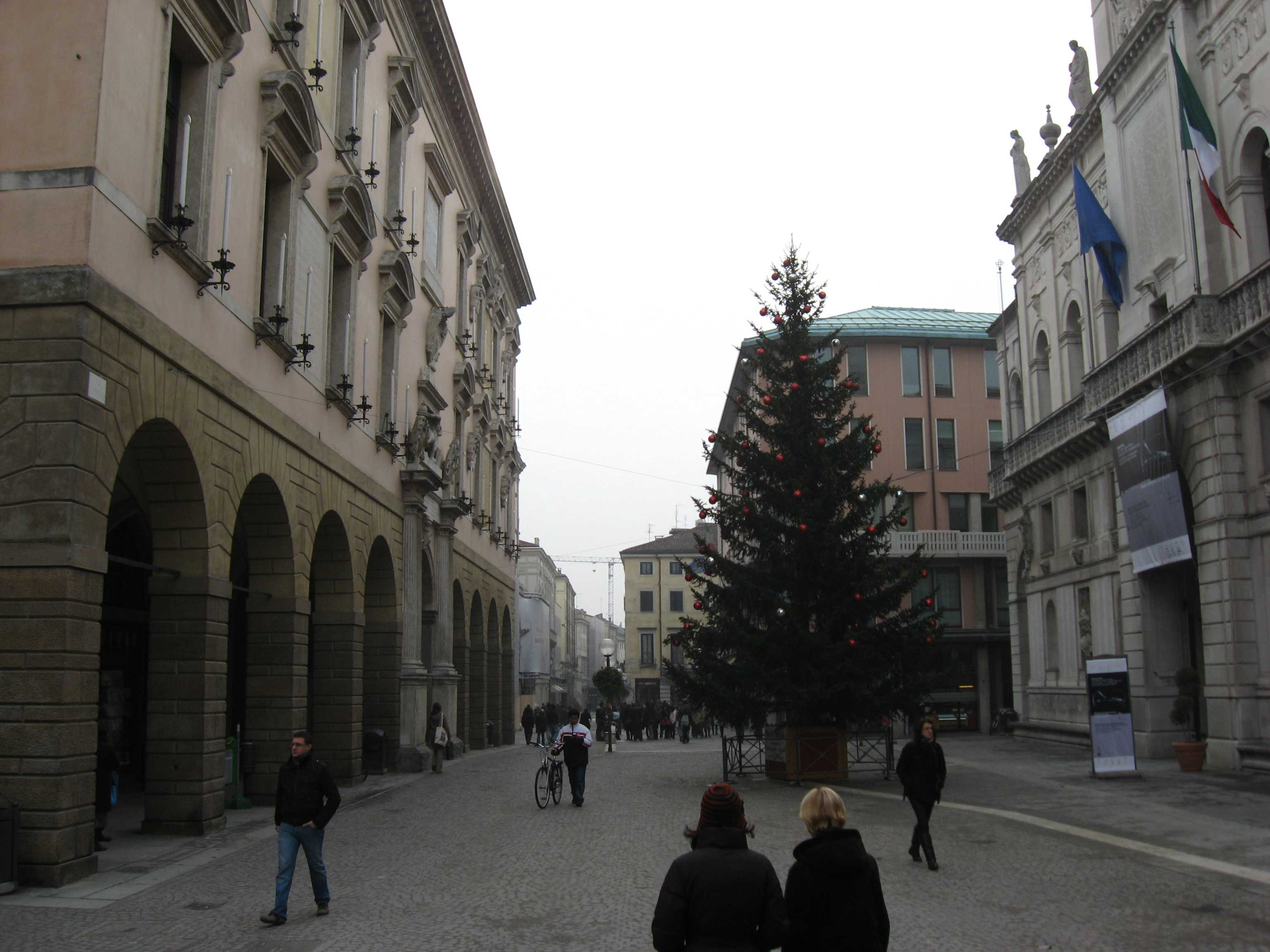 Listòn, Padova